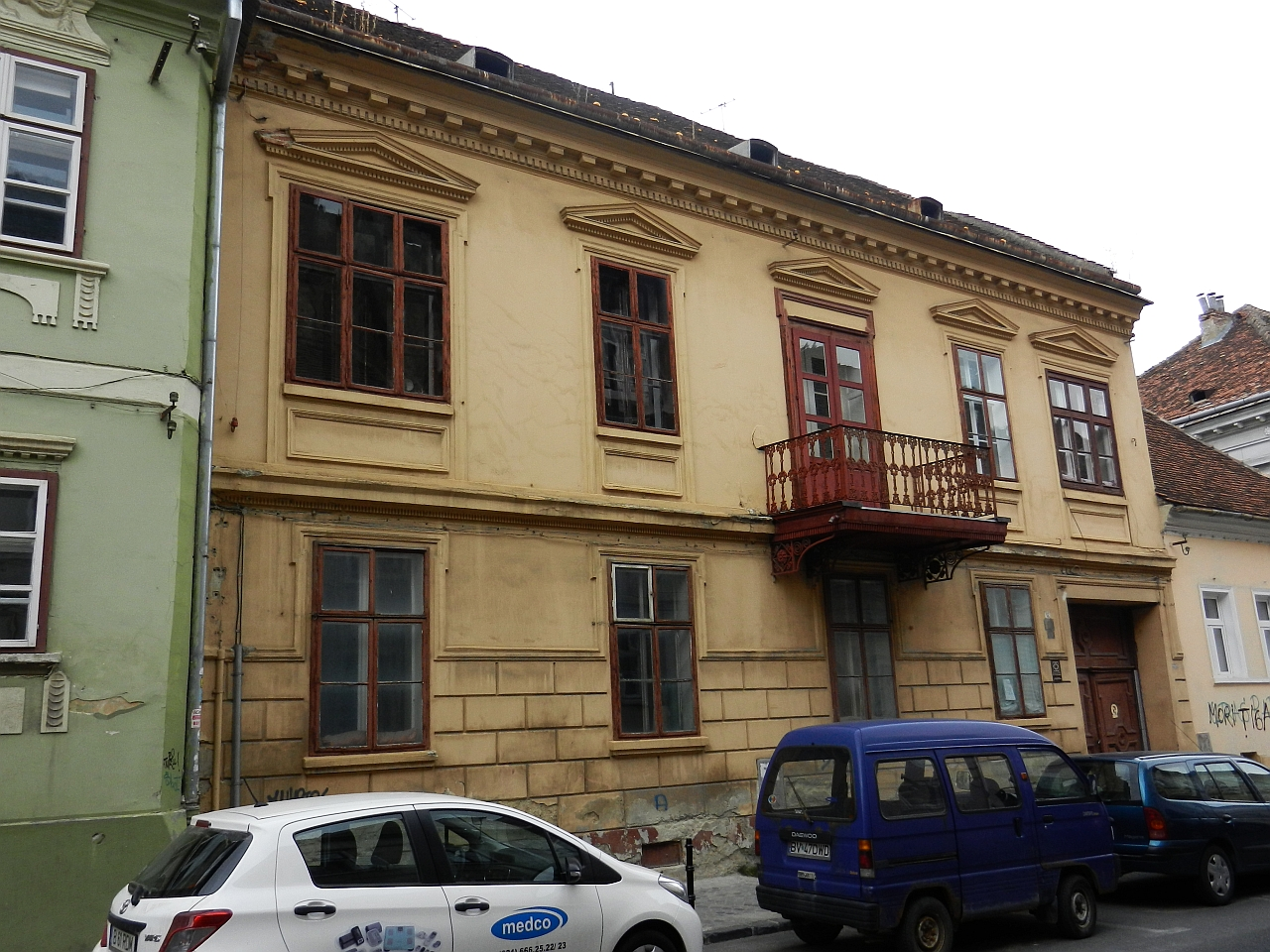 Casă monument istoric